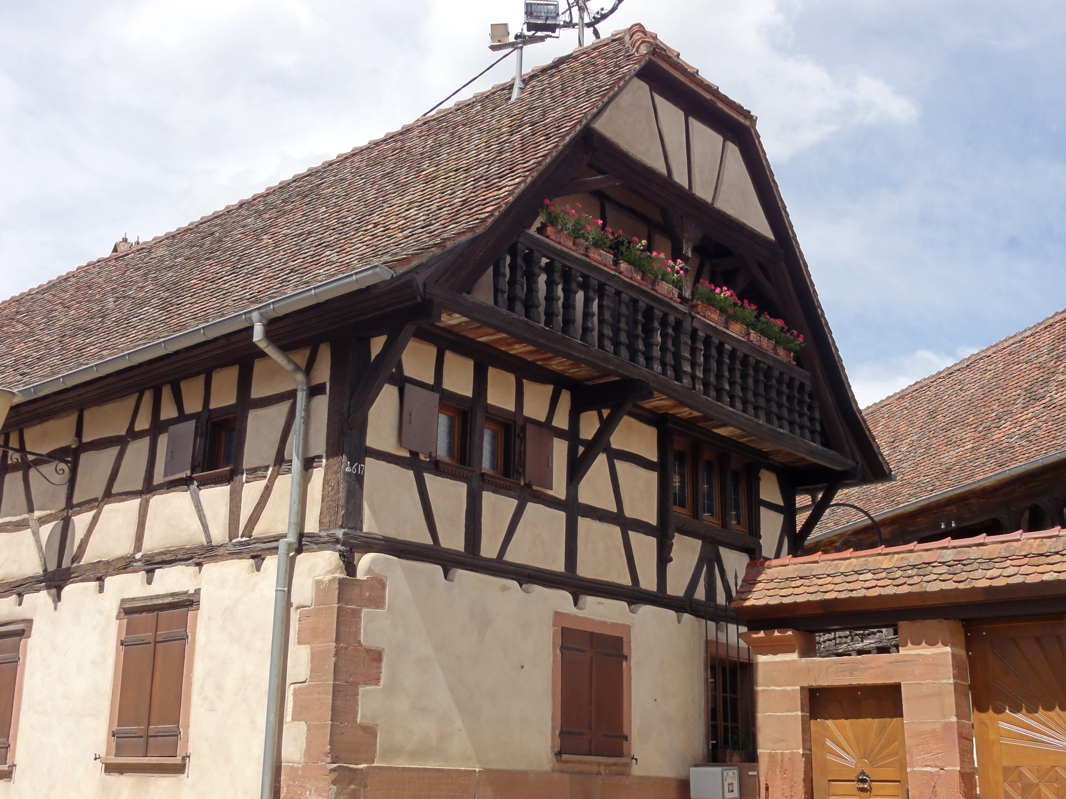 Alsace, Bas-Rhin, Imbsheim, Ferme (XVIIe), 86 rue Principale. .